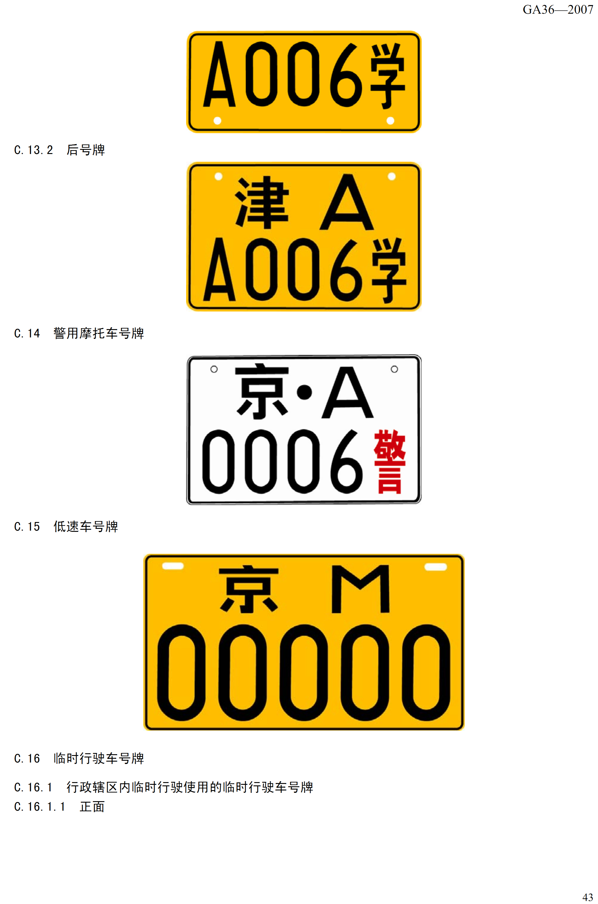 中文（中国大陆）: 中华人民共和国机动车号牌示意图(6)